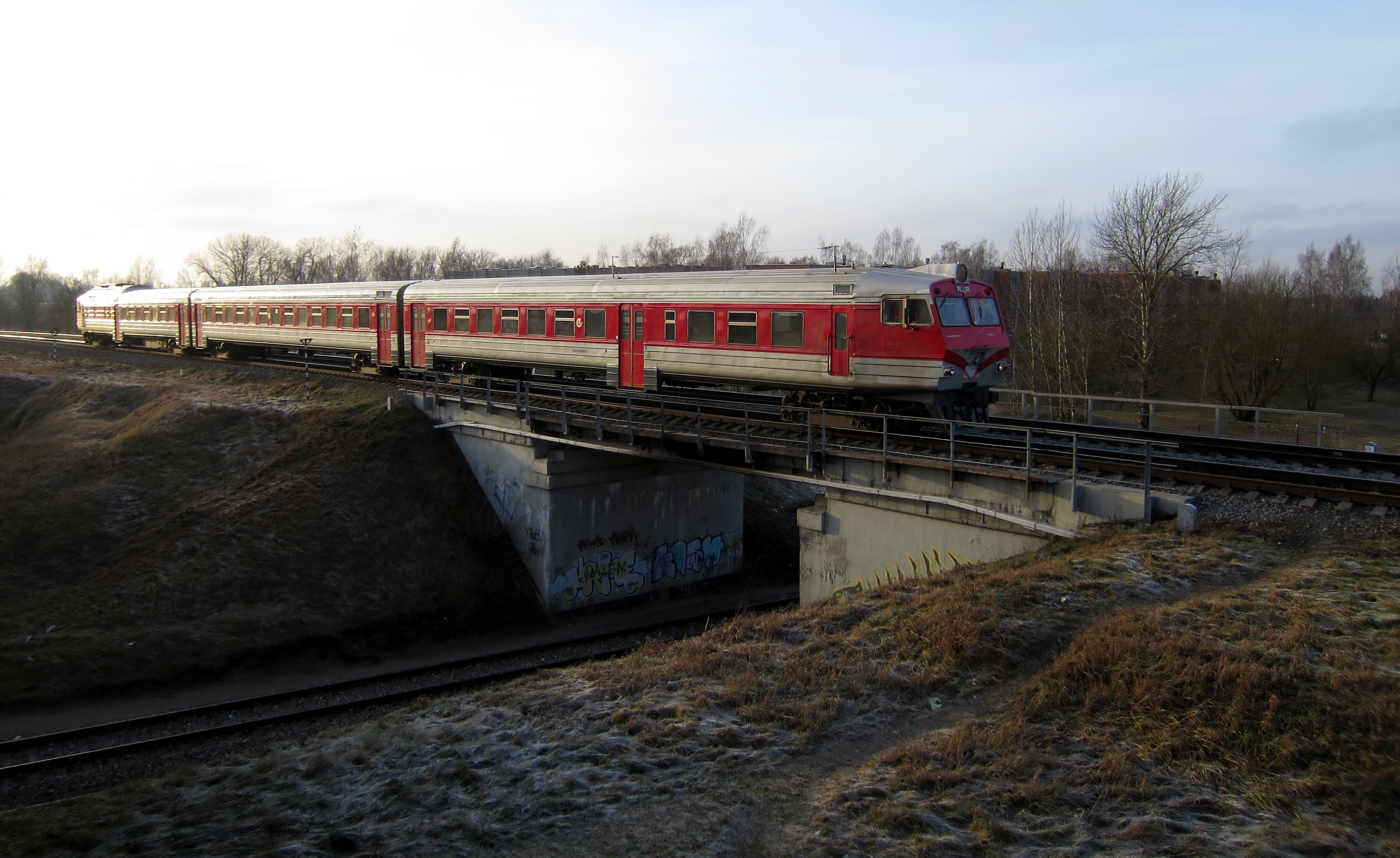 Vilciens no Viļņas pienāk Daugavpilī pāri Krustpils līnijas pārvadam.